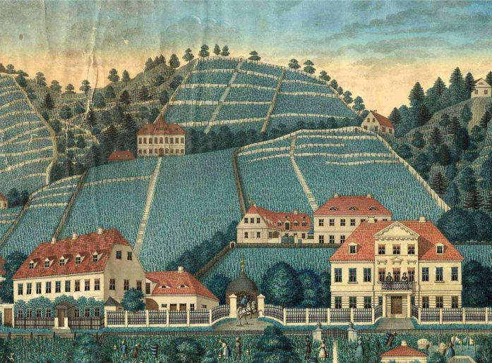 Weingut Haus Steinbach, Stich vom Weinguts-Anwesen des Kaufmanns Zembsch, li. das Winzergut, re. die Villa, davor verläuft noch die Straße. Vor etwa 1850